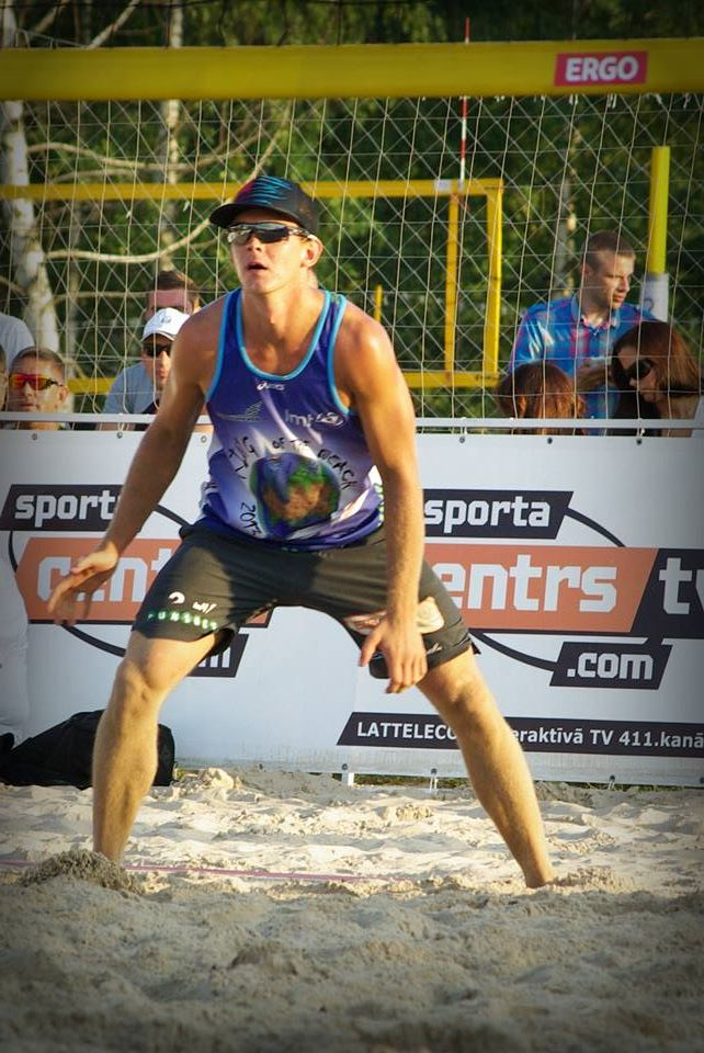 Jānis Šmēdiņš - pludamles volejbola dueta Samoilovs/Šmēdiņš dalībnieks. 2013., 2014., un 2018 gada Eiropas sudraba medaļnieks, 2015.gada Eiropas čempions, pārī ar Aleksandru Samoilovu.